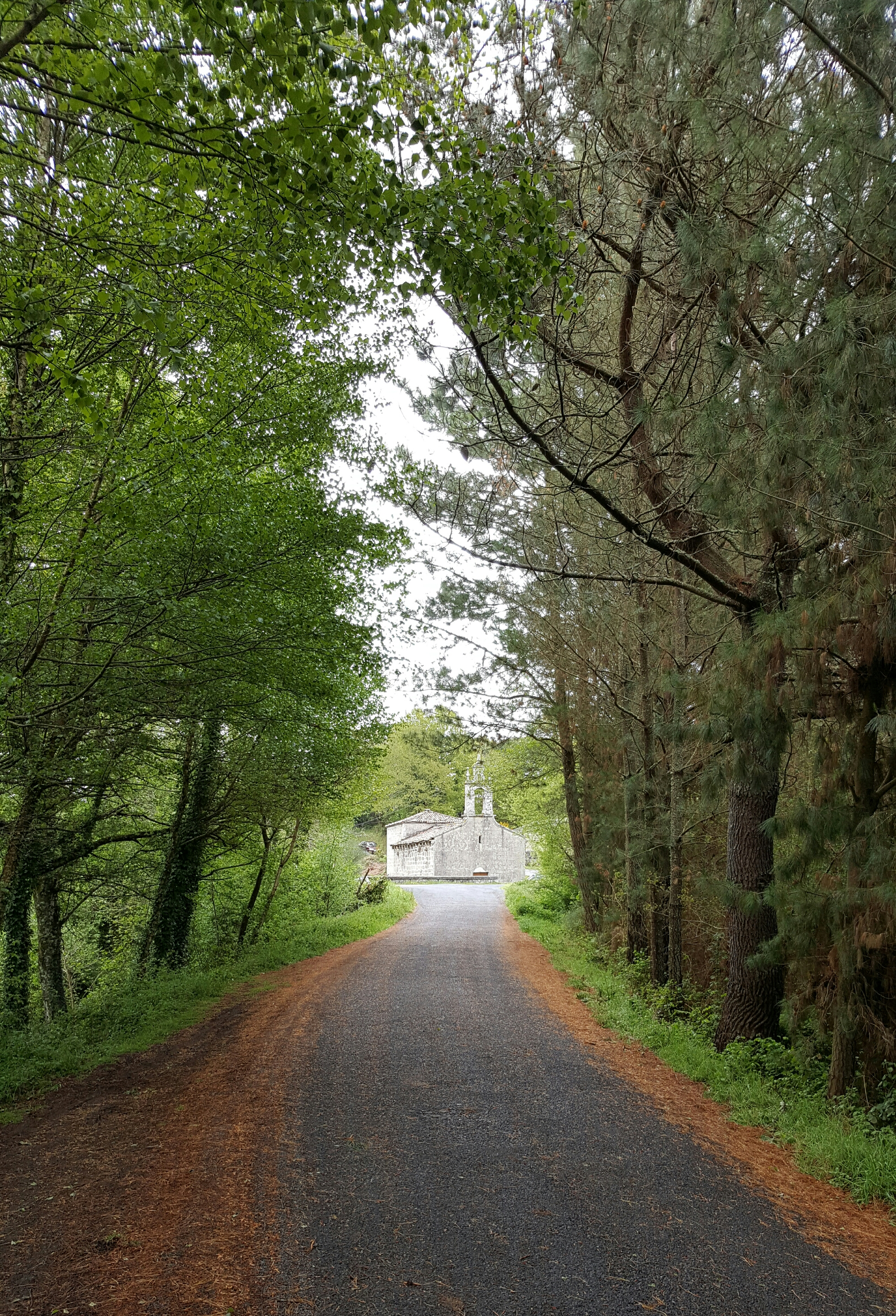 Capela da Ponte Mercé (Antas de Ulla)